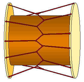 אוקדו דאיקו - תוף יפני ציור שאני ציירתי והעלתי אסף.צ 18:07, 9 מאי 2005 (UTC)